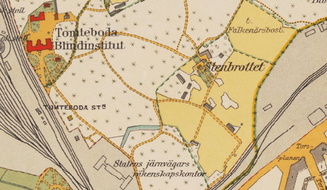 Området för dagens "Campus Solna" (innan Karolinska institutet etablerade här)